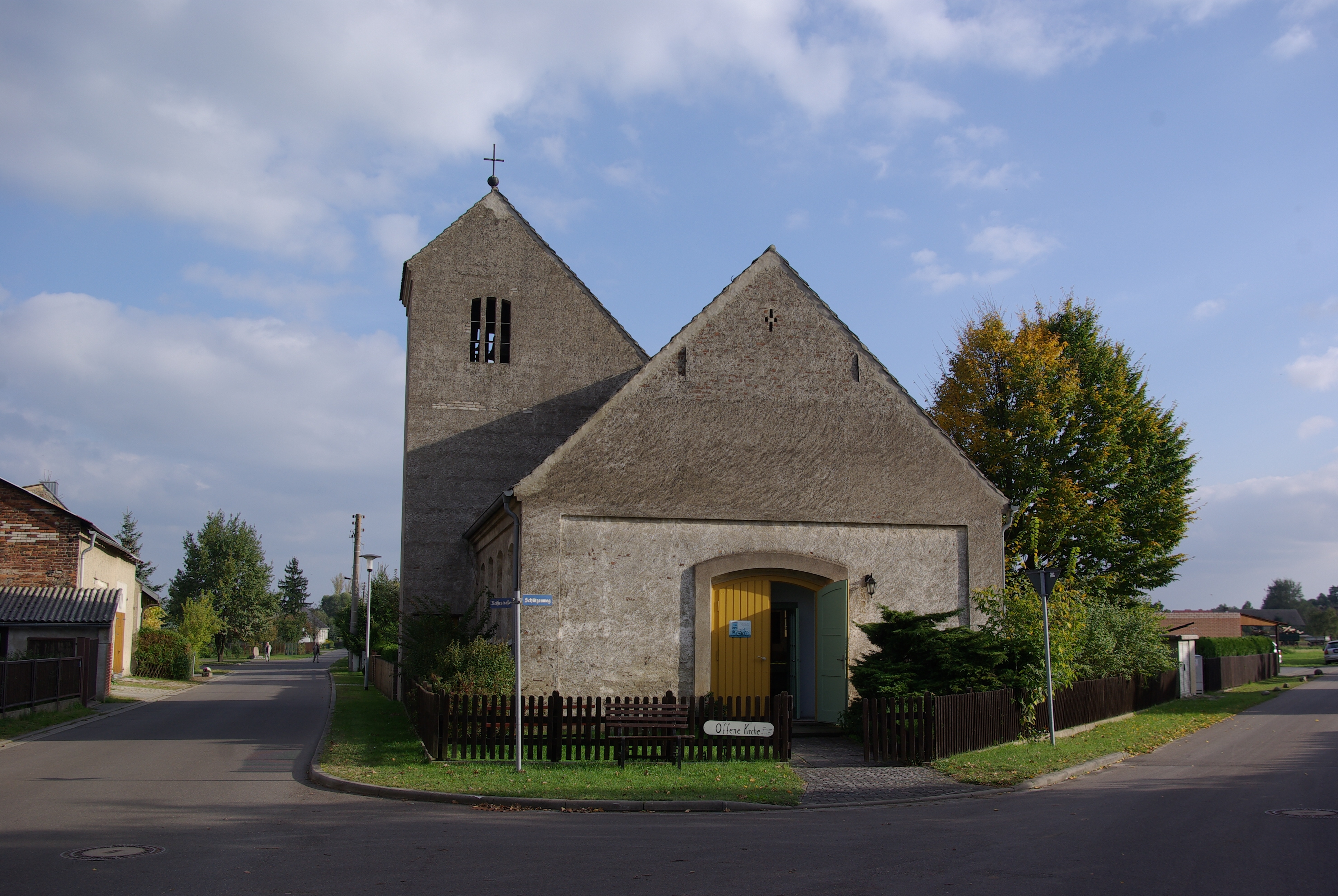 Neißemünde Ortsteil Ratzdorf in Brandenburg. Das Bild zeigt die evangelische Kirche in der Nähe des Friedhofes.